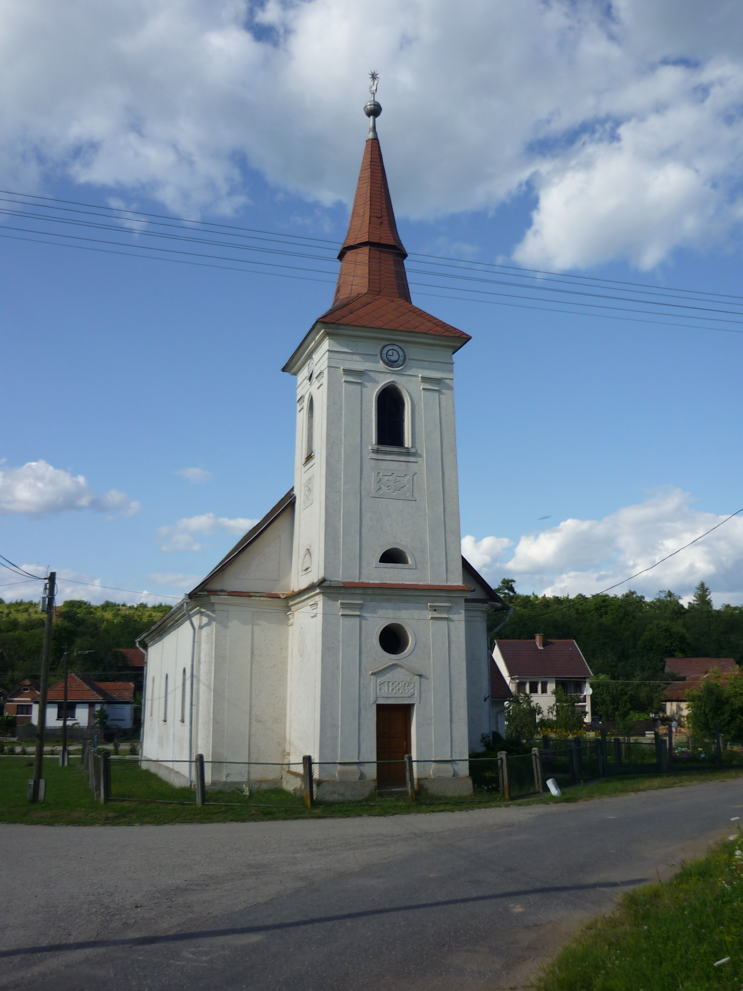 A kánói református templom